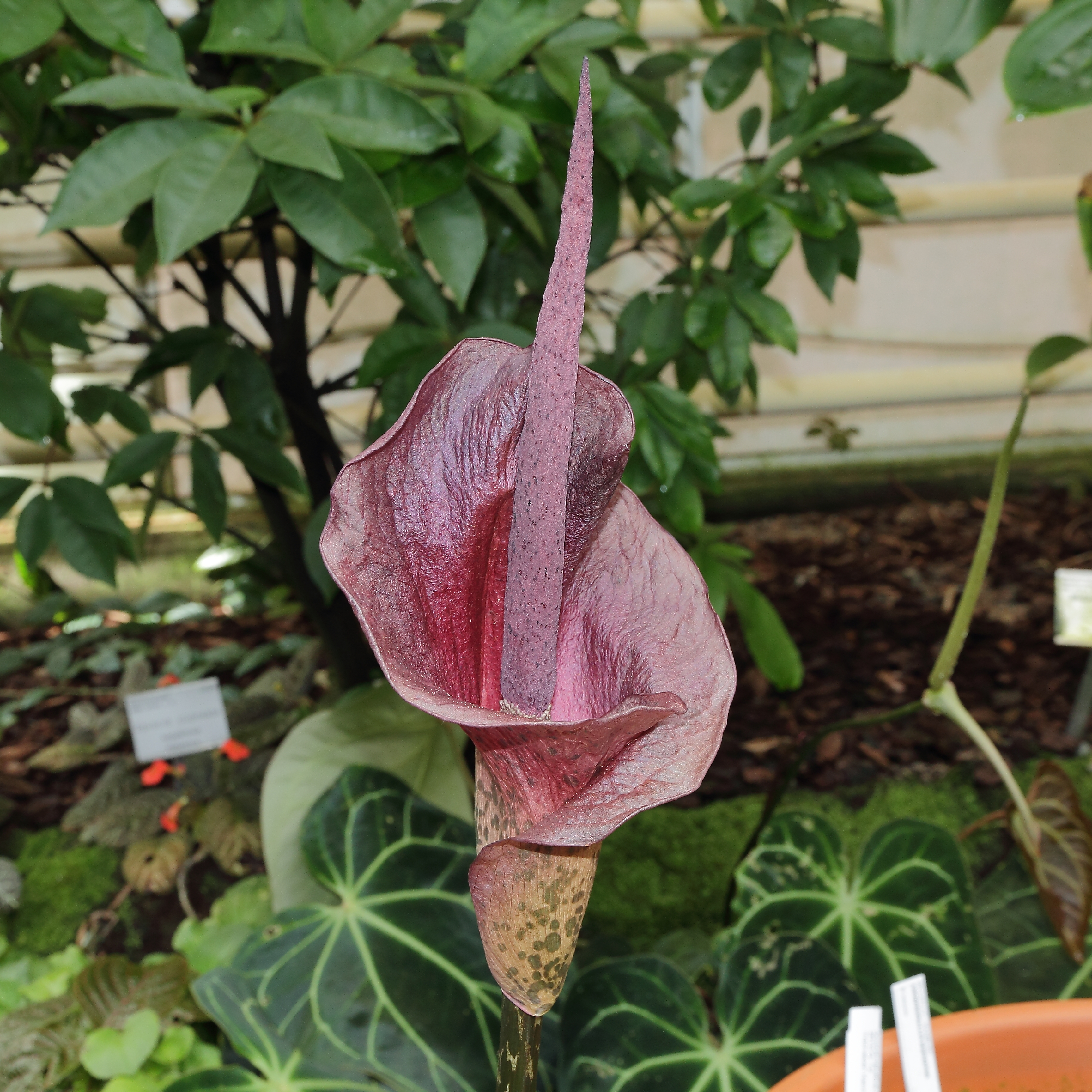 Amorphophallus konjac i Göteborgs Botaniska Trädgård.